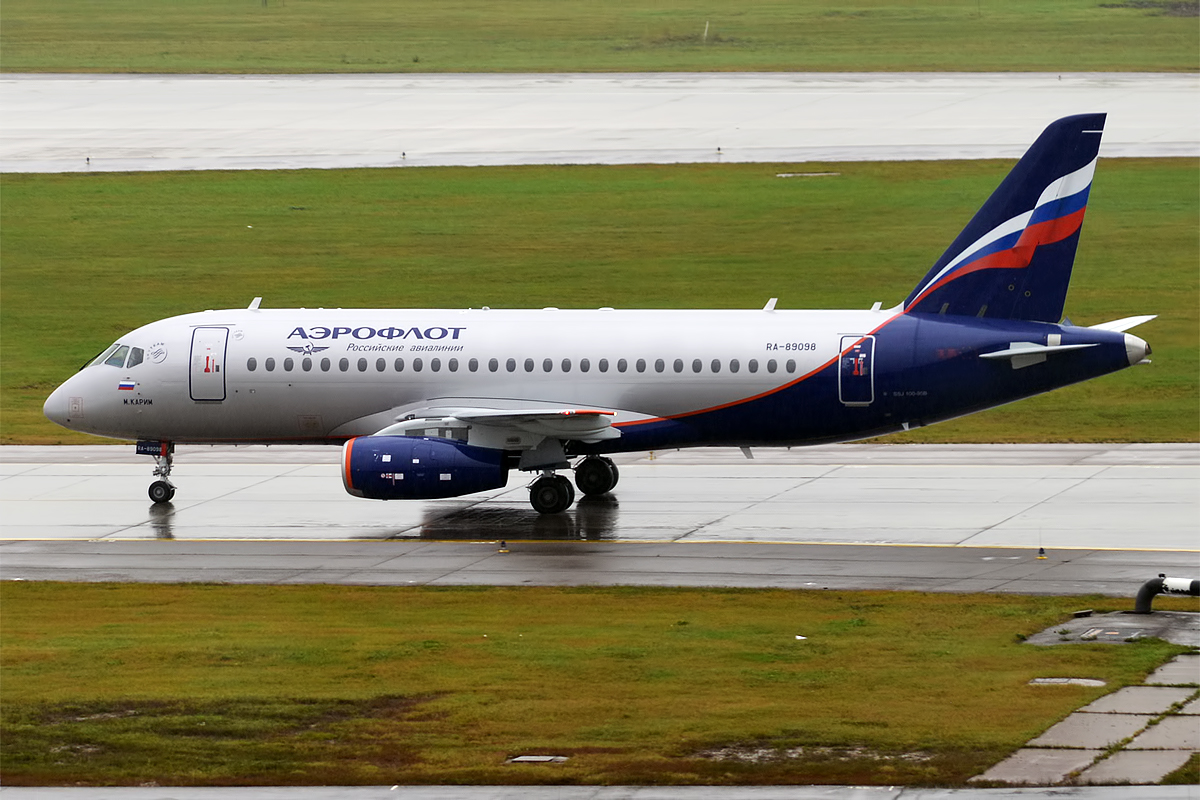 Aeroflot, RA-89098, Sukhoi Superjet 100-95B